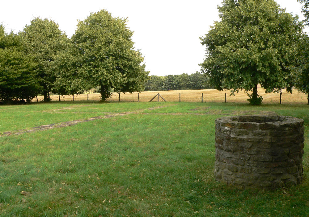 Aufgemauerter Brunnen des Stift Asbeke